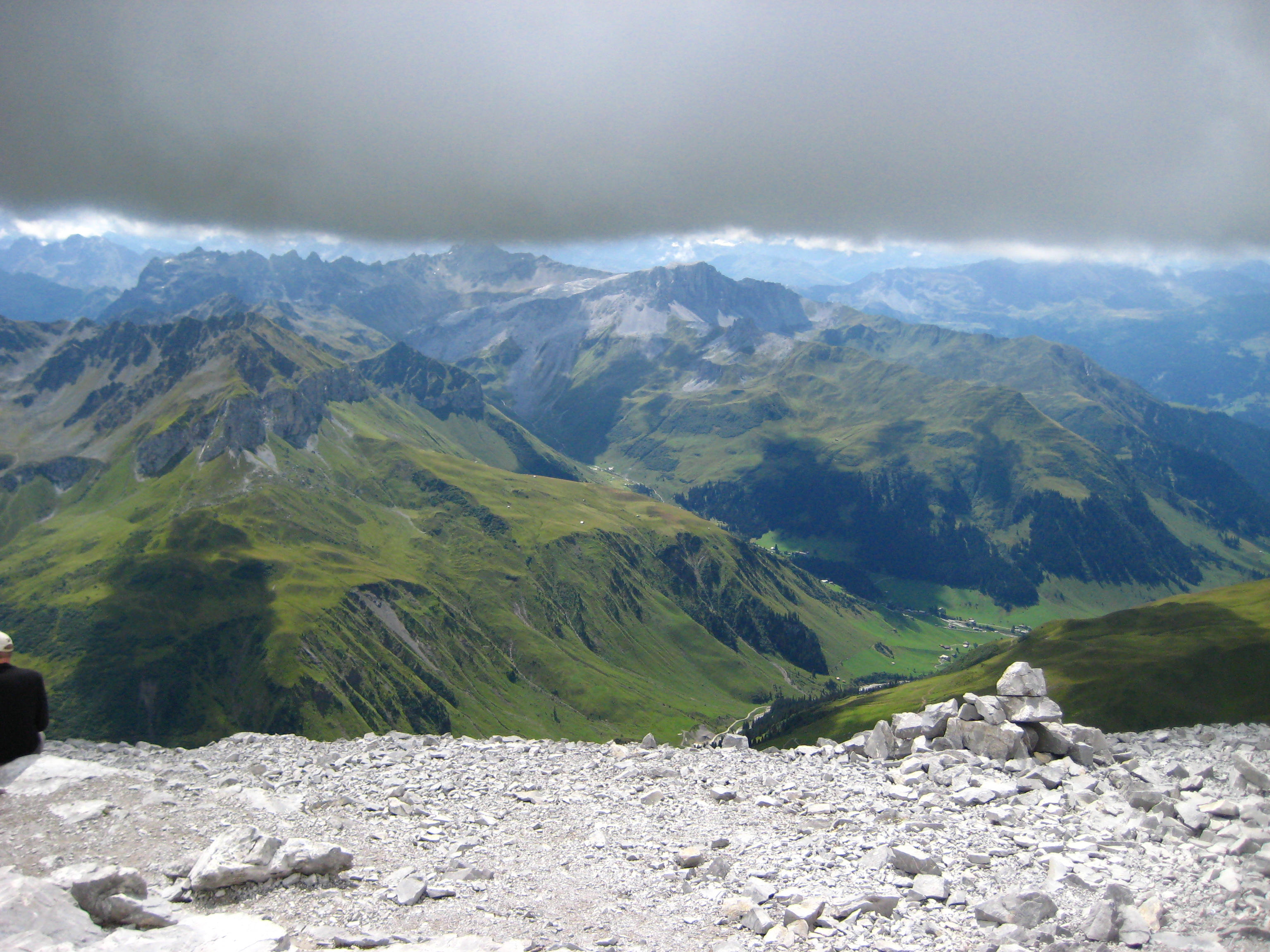 Sulzfluh, Rätikon, Schweiz